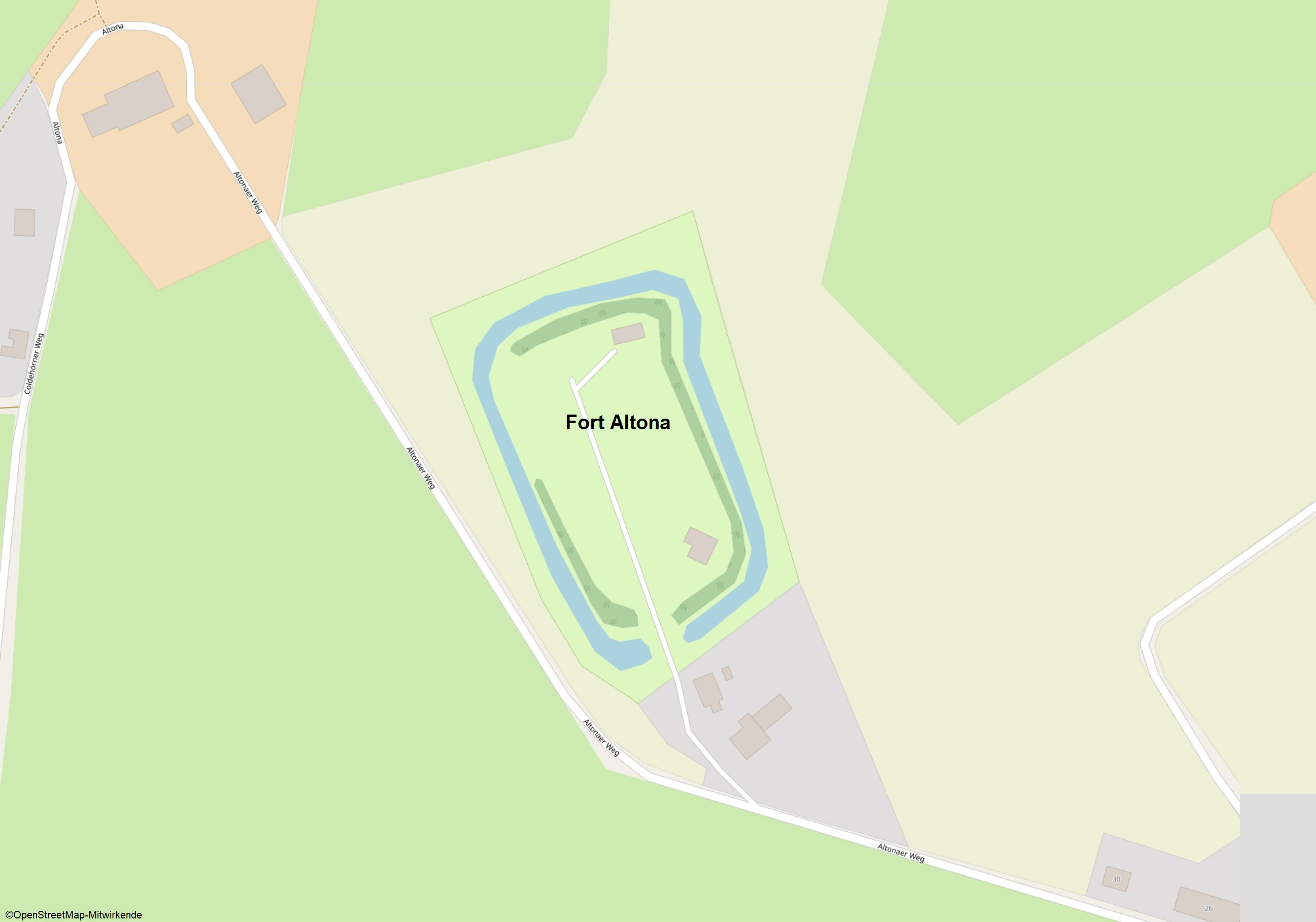 Karte vom Fort Altona